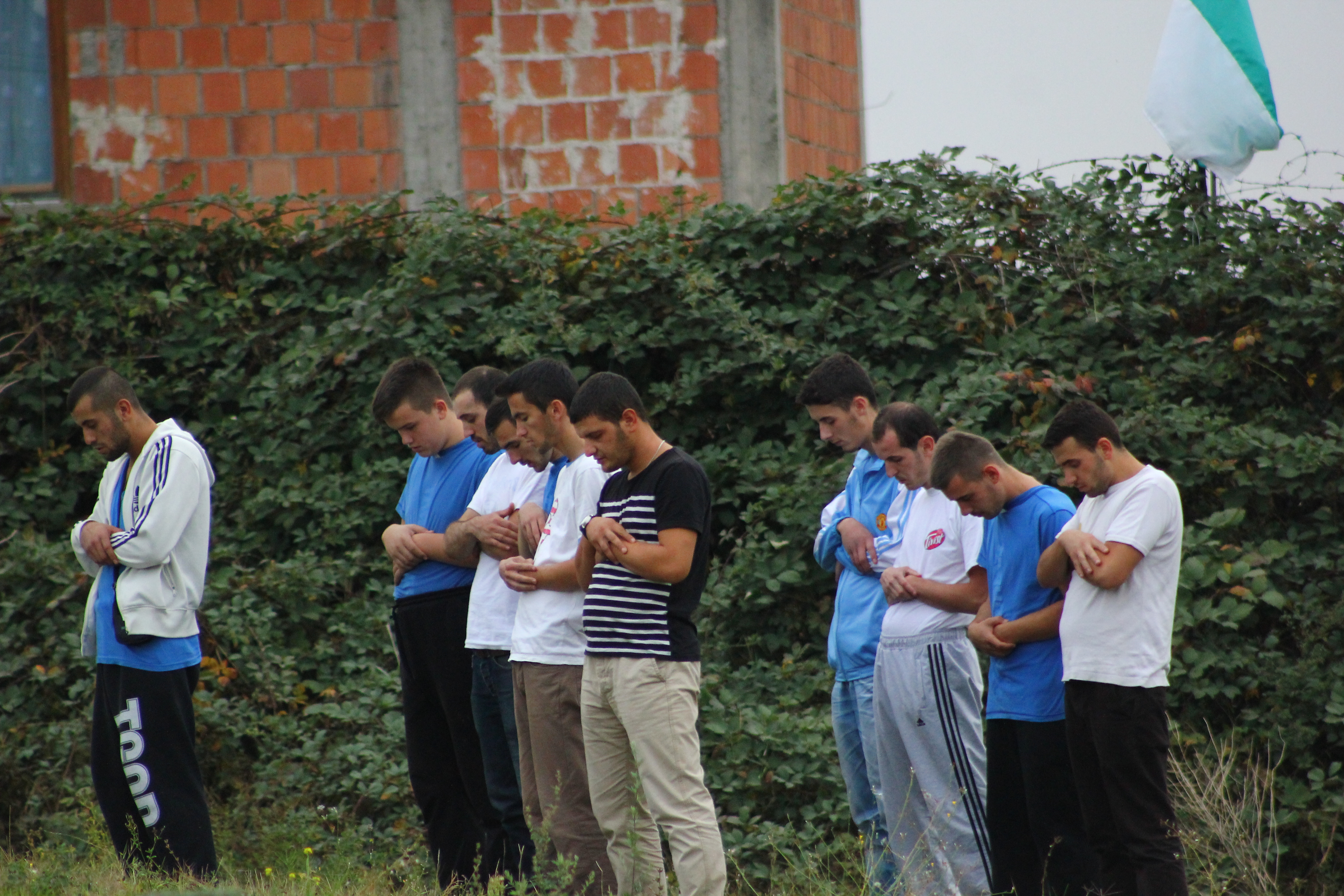 Tifozët duke e kryer ceremoninë e faljes së namazit, gjatë një ndeshje futbollistike në stadiumin 'Riza Lushta' në Mitrovicë